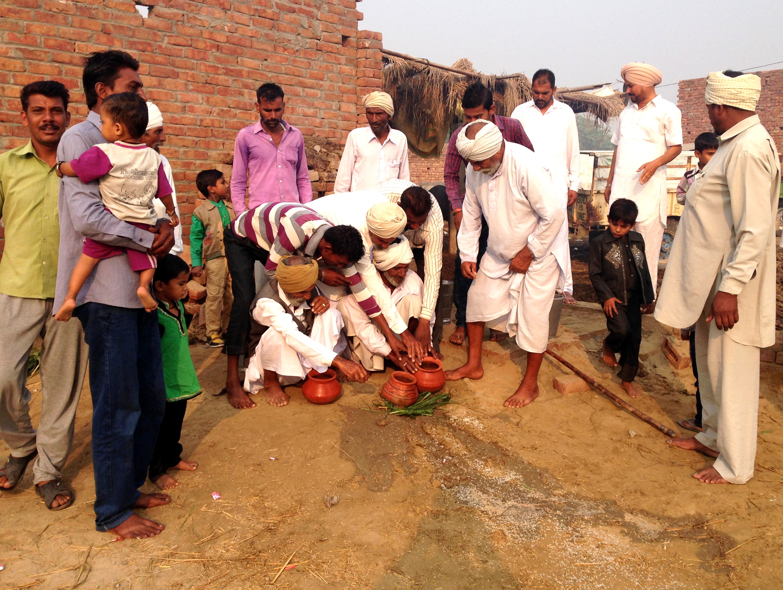 ਪੰਜਾਬੀ: ਬਾਜ਼ੀਗਰ ਕਬੀਲੇ ਦਾ ਭਾਈਚਾਰਾ ਆਪਣੇ ਪਿੱਤਰਾਂ (ਪੂਰਵਜ਼ਾਂ) ਨੂੰ ਦਿਵਾਲੀ ਵਾਲੇ ਦਿਨ ਪਾਣੀ ਅਰਪਣ ਕਰਦਾ ਹੋਇਆ। ਬਾਜ਼ੀਗਰ ਕਬੀਲੇ ਵਿਚ ਇਹ ਇਕ ਸਮਾਜਕ ਰੀਤ ਵਜੋੇੇੇਂ ਨਿਭਾਈ ਜਾਂਦੀ ਹੈ।